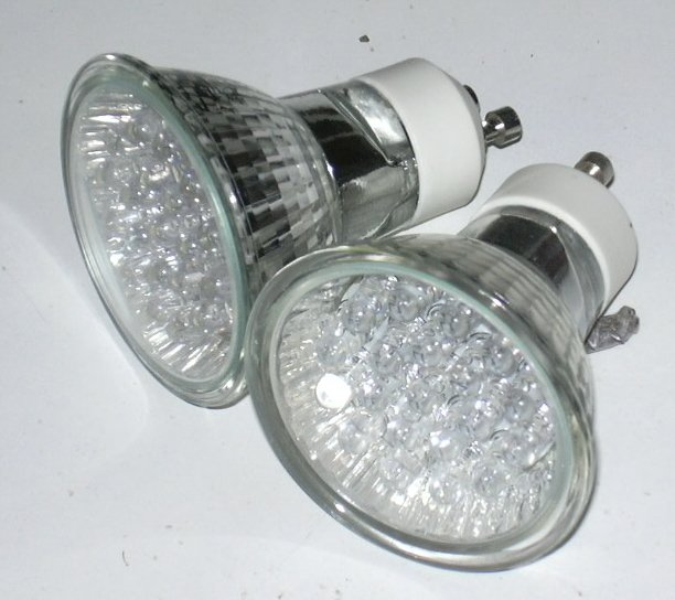 Ampoules à LED, composées de 20 LED, puissance 1 Watt.